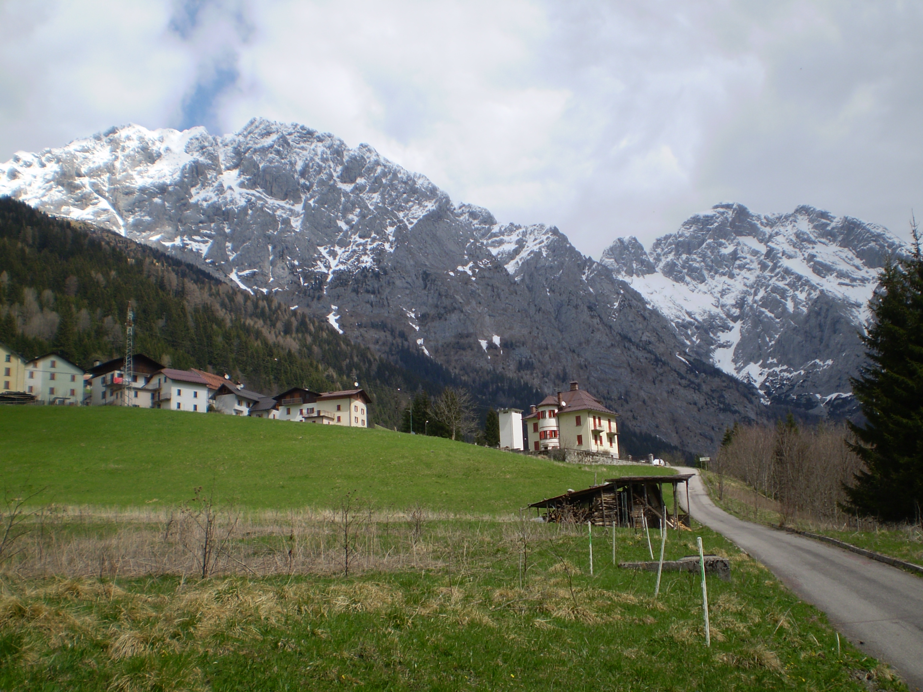 Collinette, frazione di Forni Avoltri, Carnia, Friuli